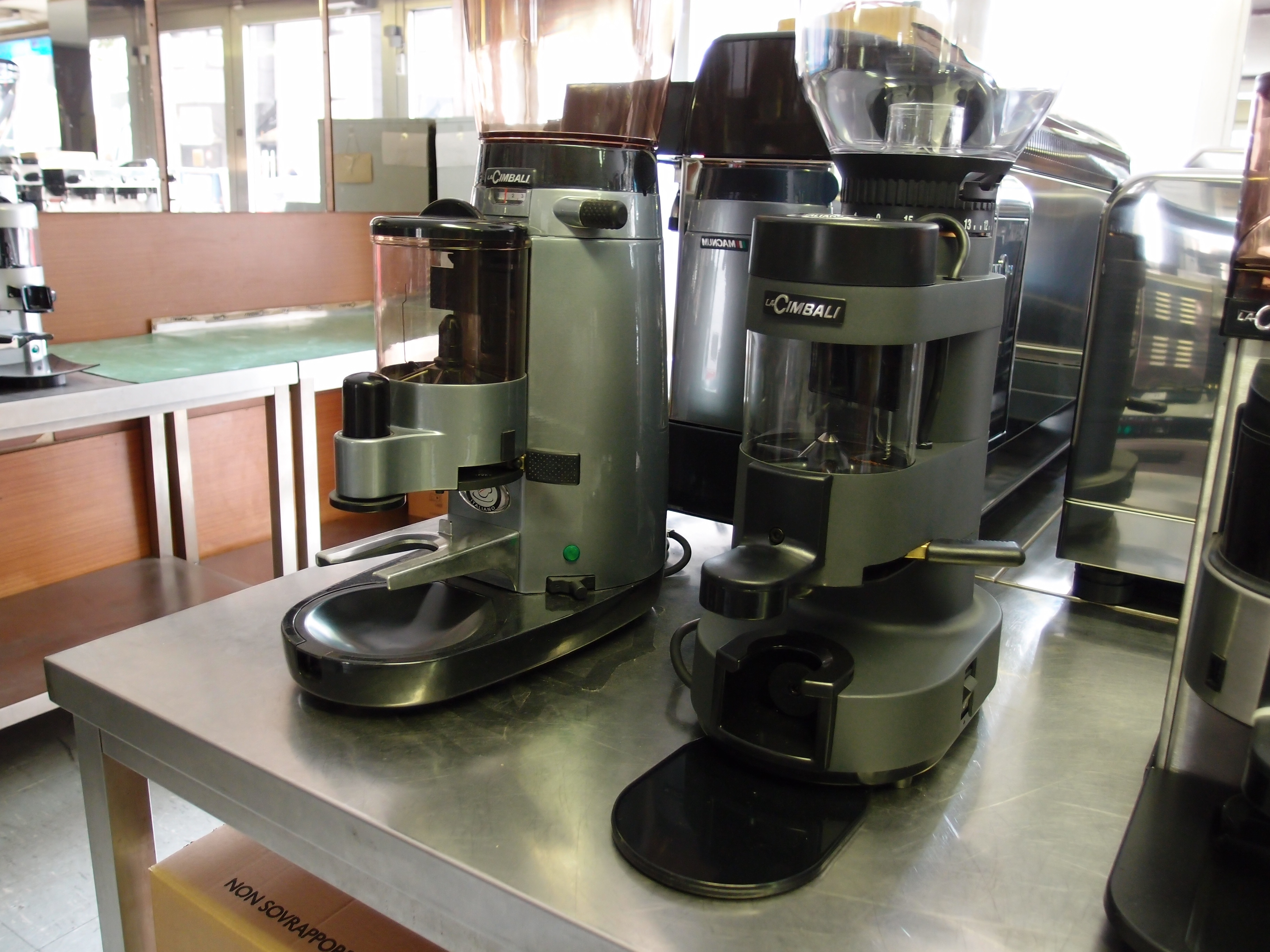 "La Cimbali" - professionelle Kaffeemühlen Datum: 26.08.2011 Urheber: M. Pfeiffer alias Benutzer:Gordito1869 Quelle: privates Fotoarchiv des Urhebers